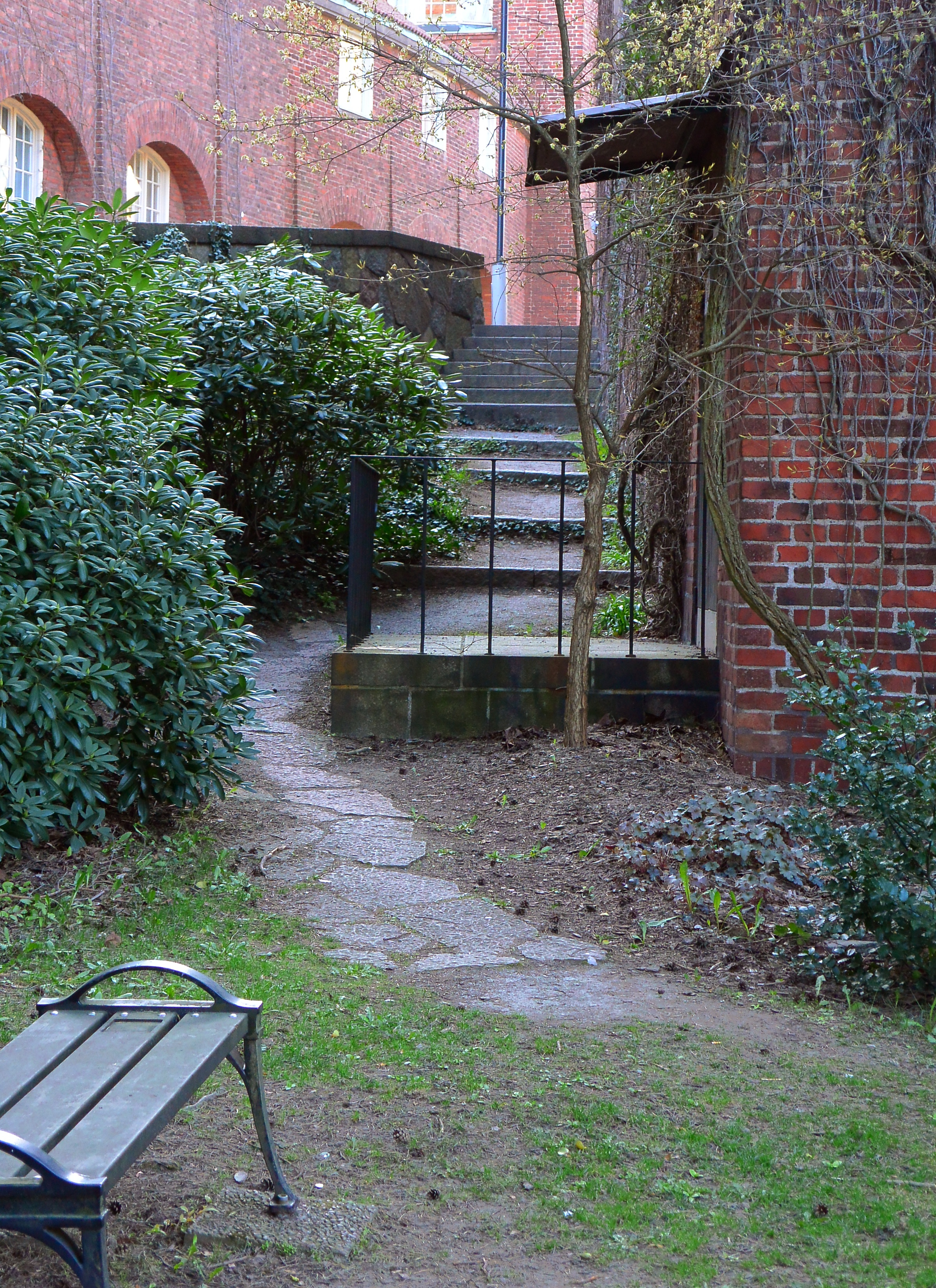 Engelska parken vid KTH på Norra Djurgården i Stockholm.